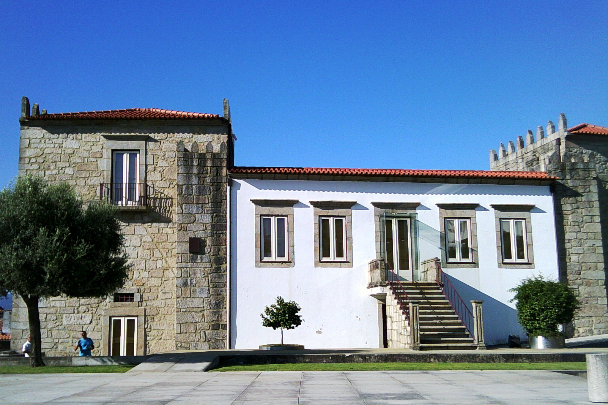 Paços do Marquês, freguesia, cidade e concelho de Ponte de Lima, concelho de Viana do Castelo, Portugal.